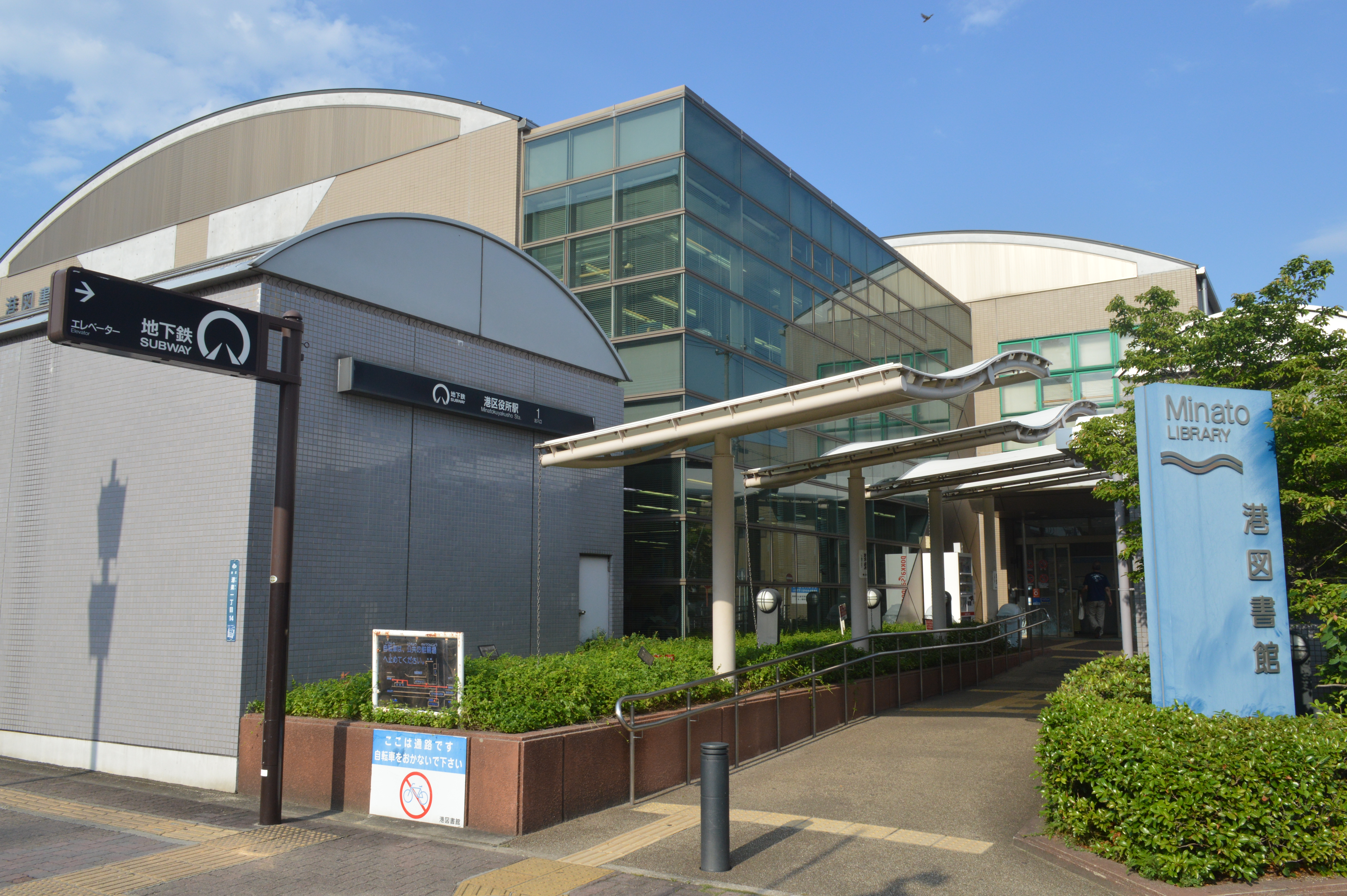 名古屋市図書館のひとつである名古屋市港図書館。